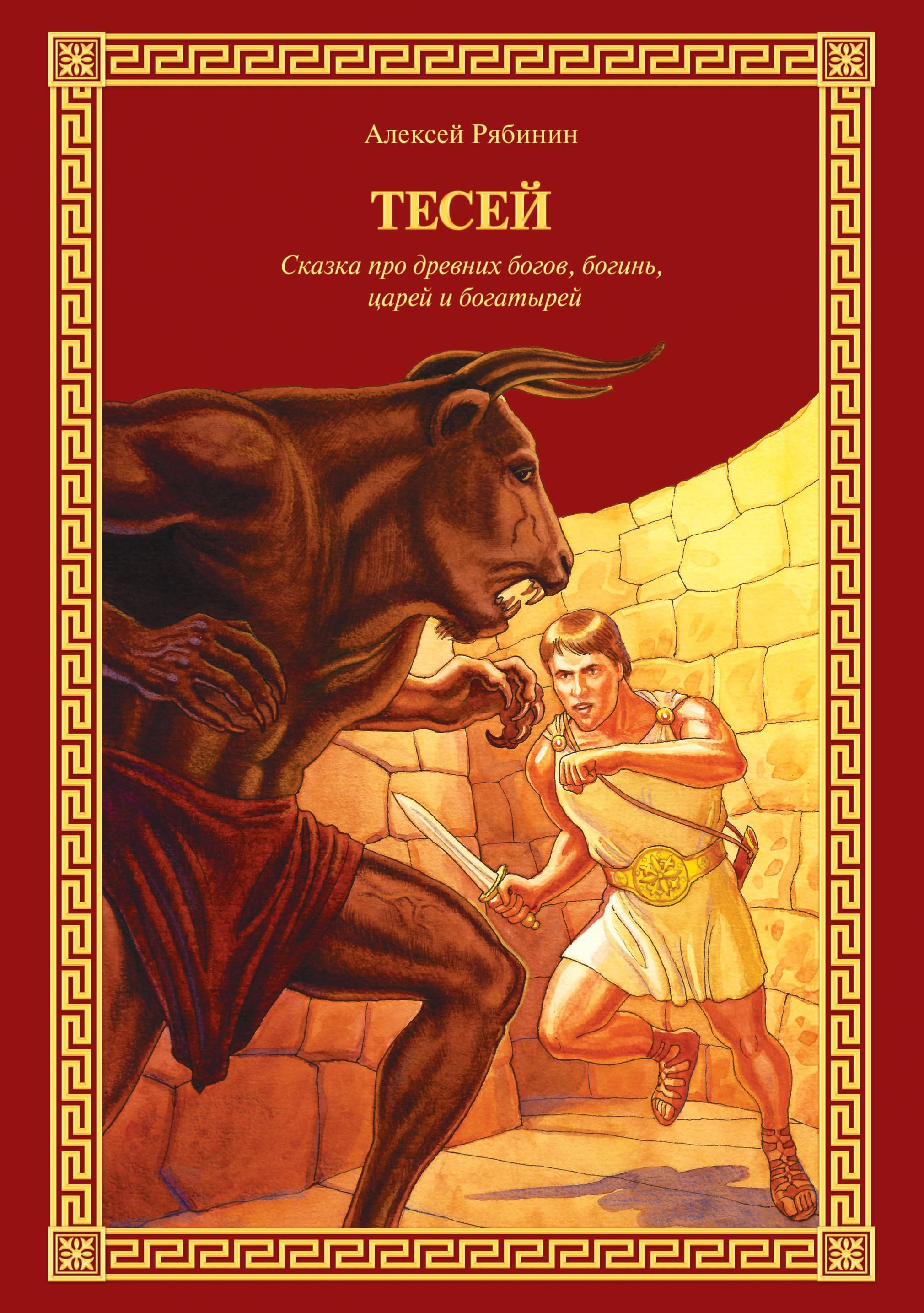 Обложка книги Алексея Рябинина «Тесей. Сказка про древних богов, богинь, царей и богатырей». Издательство «Антология», СПб.: 2018 г.